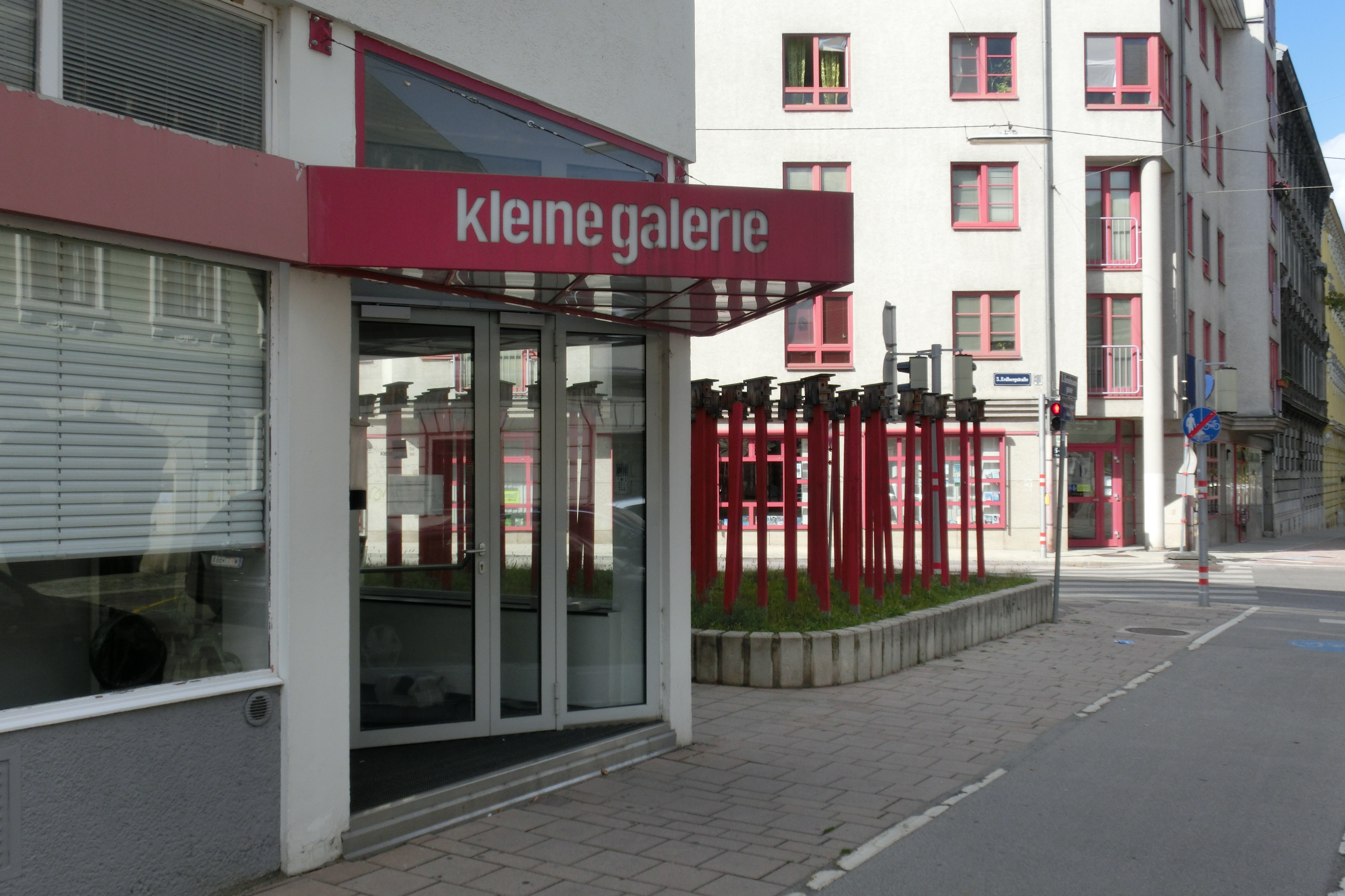 Die Kleine Galerie Wien ist eine Kunstgalerie im Bezirk Landstraße, Wien